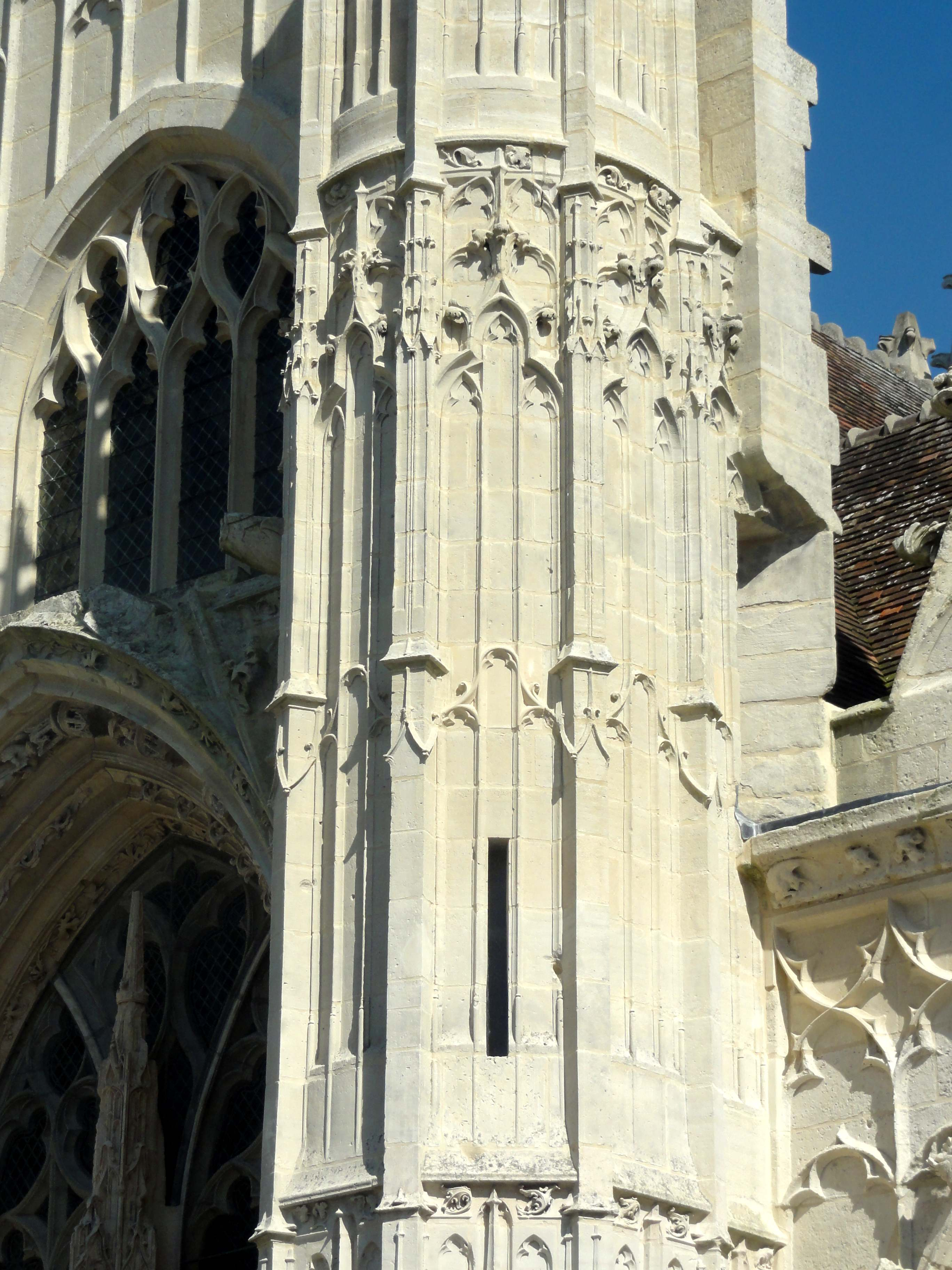 Église Saint-Pierre de Senlis - voir le titre du fichier.